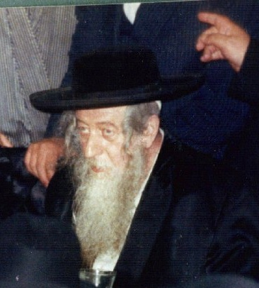 רבי אברהם יצחק קאהן, האדמו"ר מתולדות אהרן